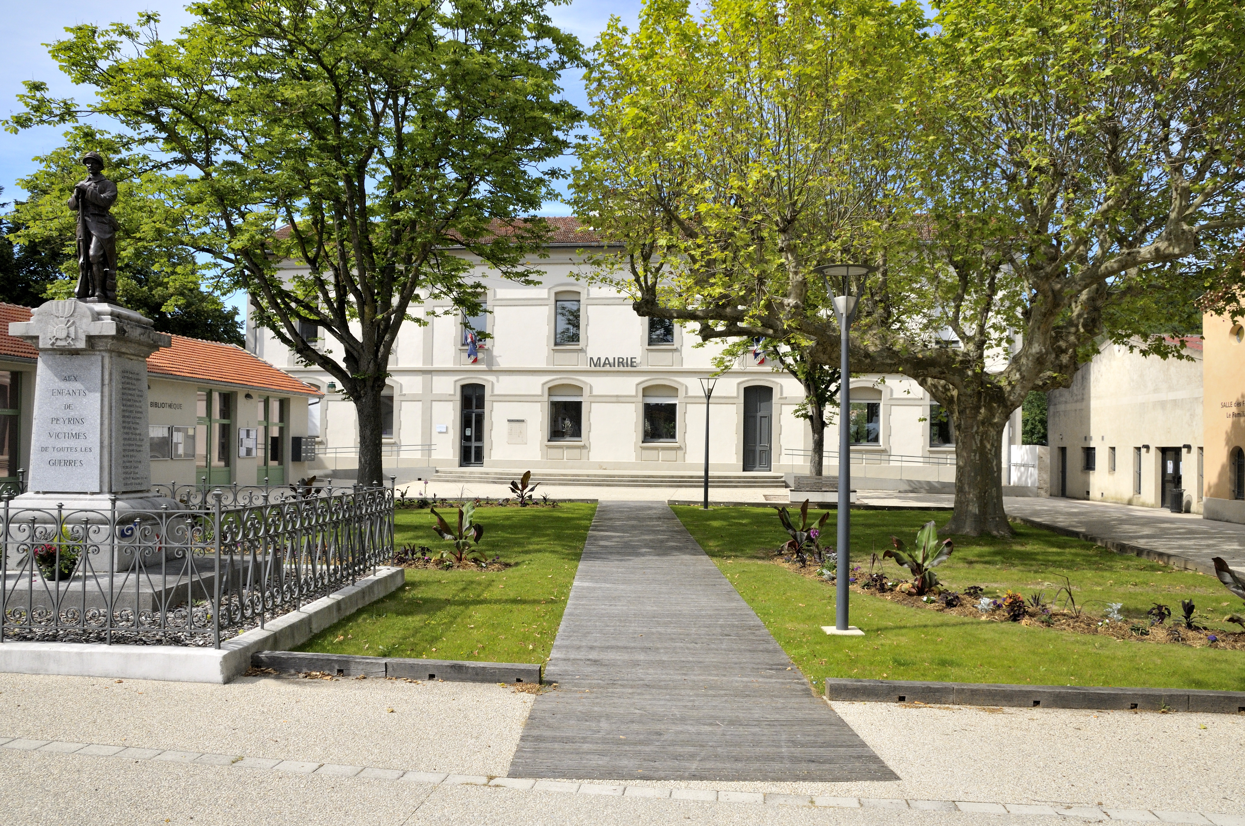 la mairie